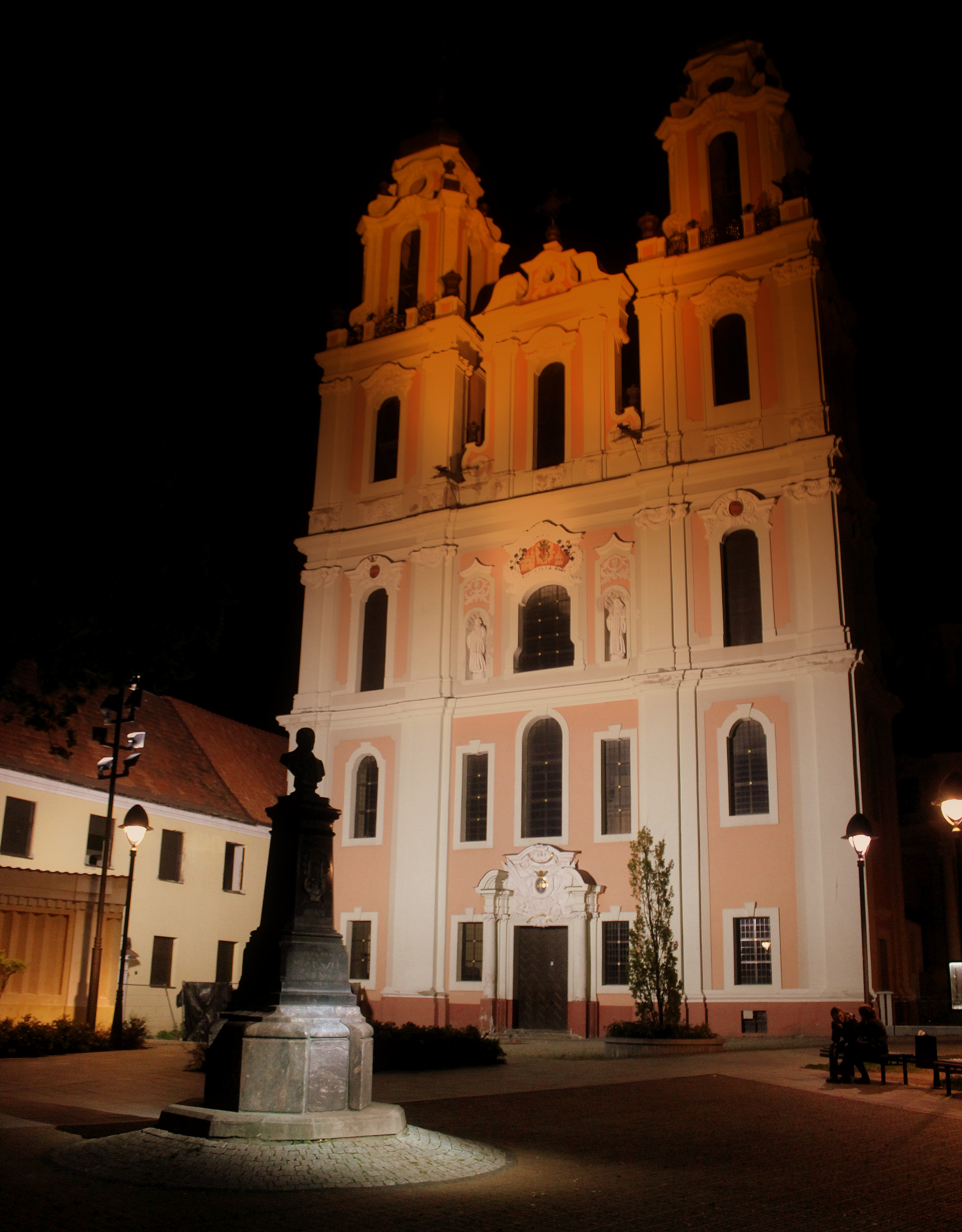 VILLINUS OLD TOWN LITHUANIA SEP 2013